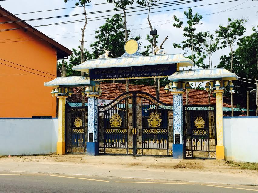 மீசாலை வீரசிங்கம் மகா வித்தியாலயம்